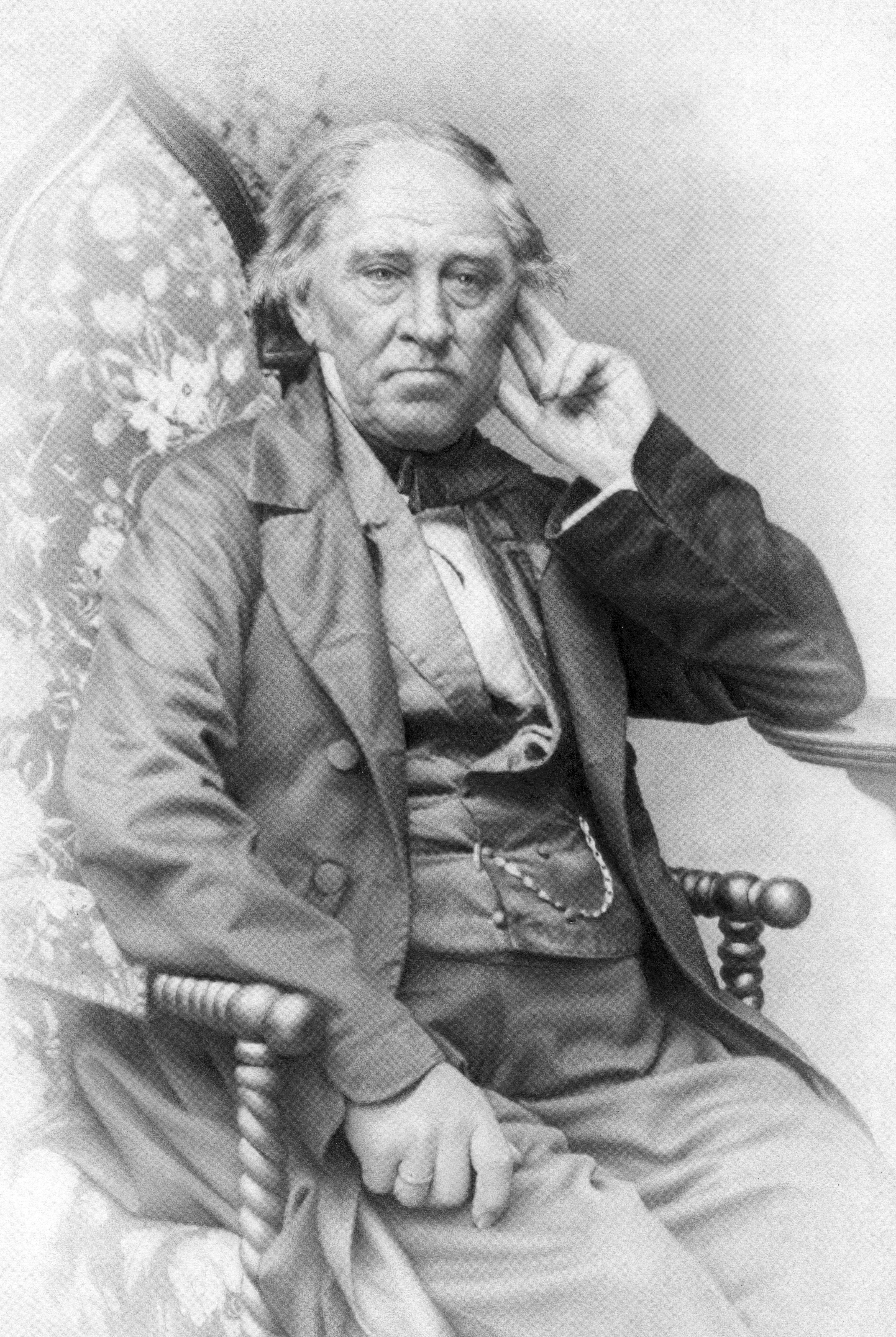 Фотография Максимилиана Бихеле из семейного архива, сделана фотографом Фр. Такманом в Полтаве около 1865 года